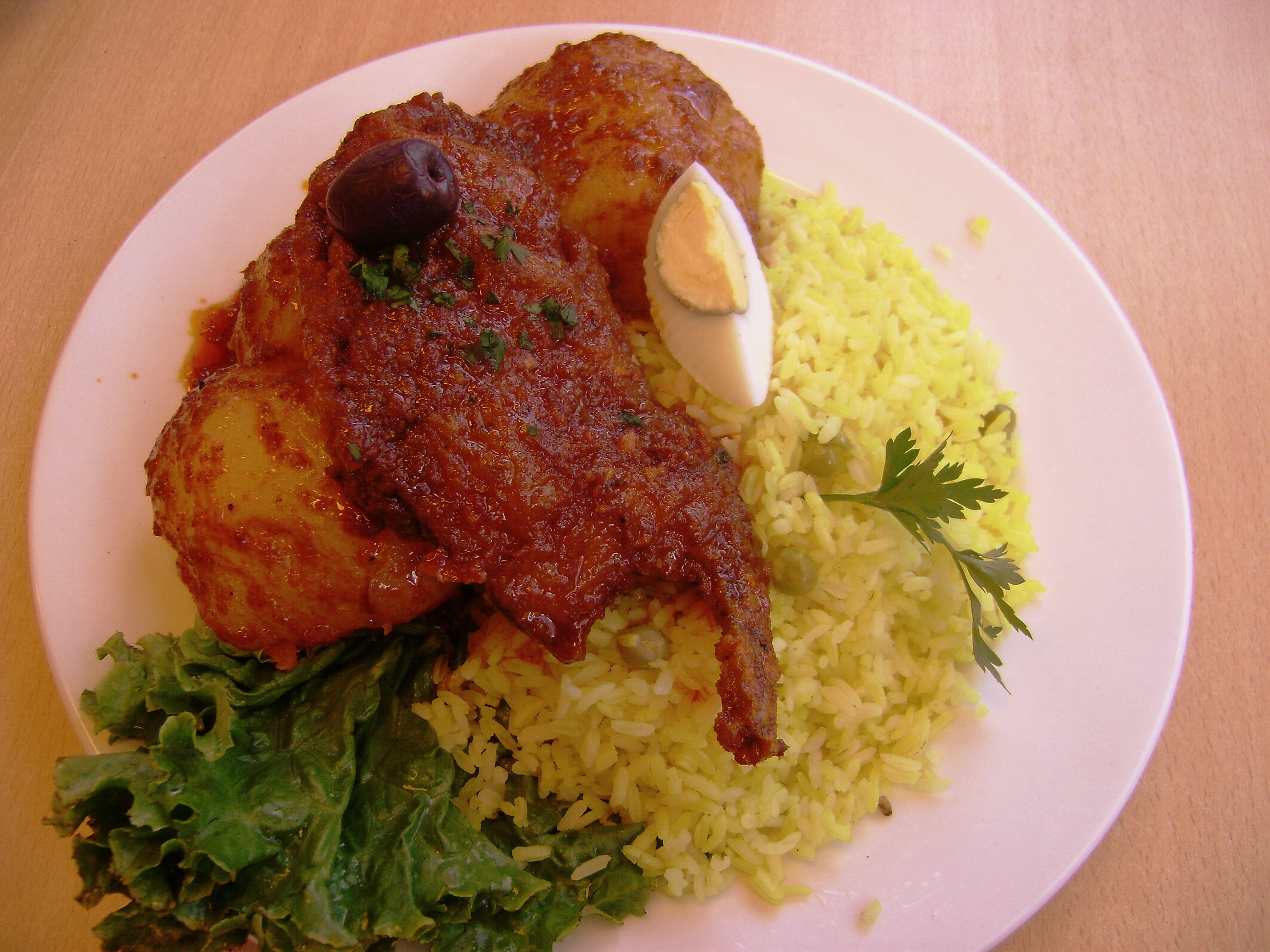 Cuy colorado. Huancayo, Perú.